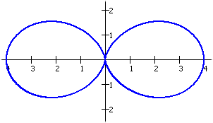 Doppio Uovo Curva matematica